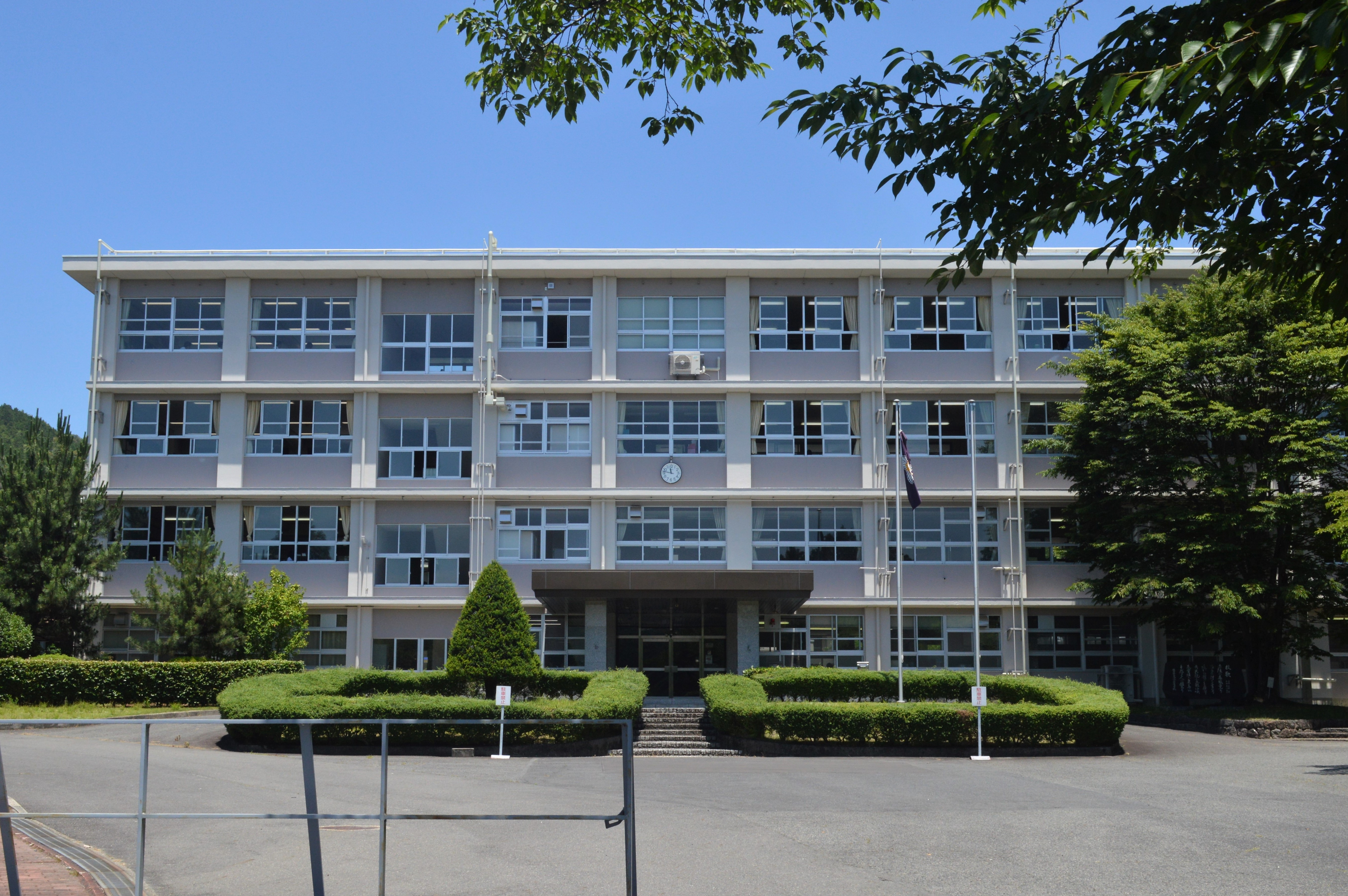 岐阜県可児郡御嵩町にある岐阜県立東濃高等学校（岐阜県立東濃高校）。